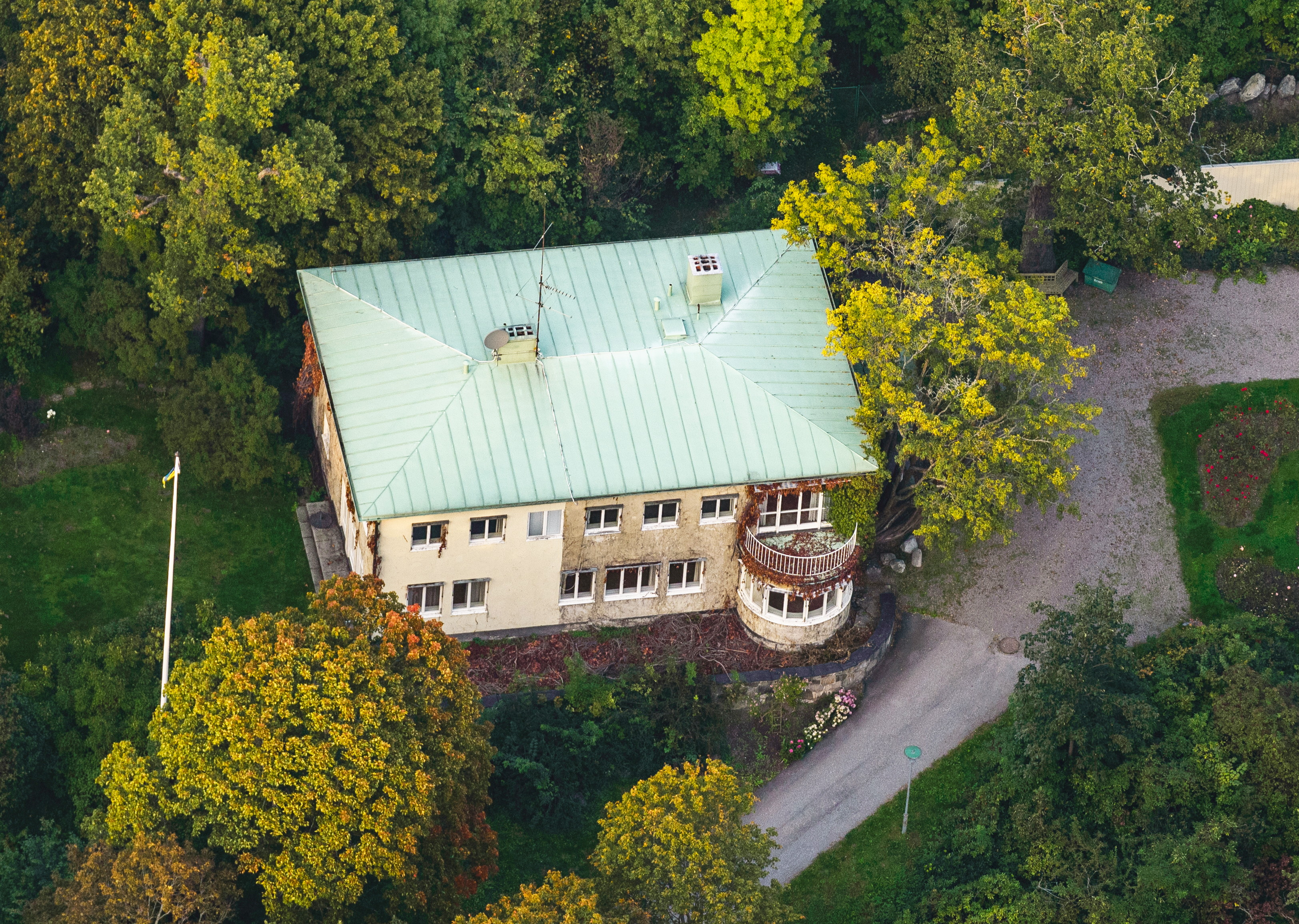 Villa Solbacken (beskuren version)